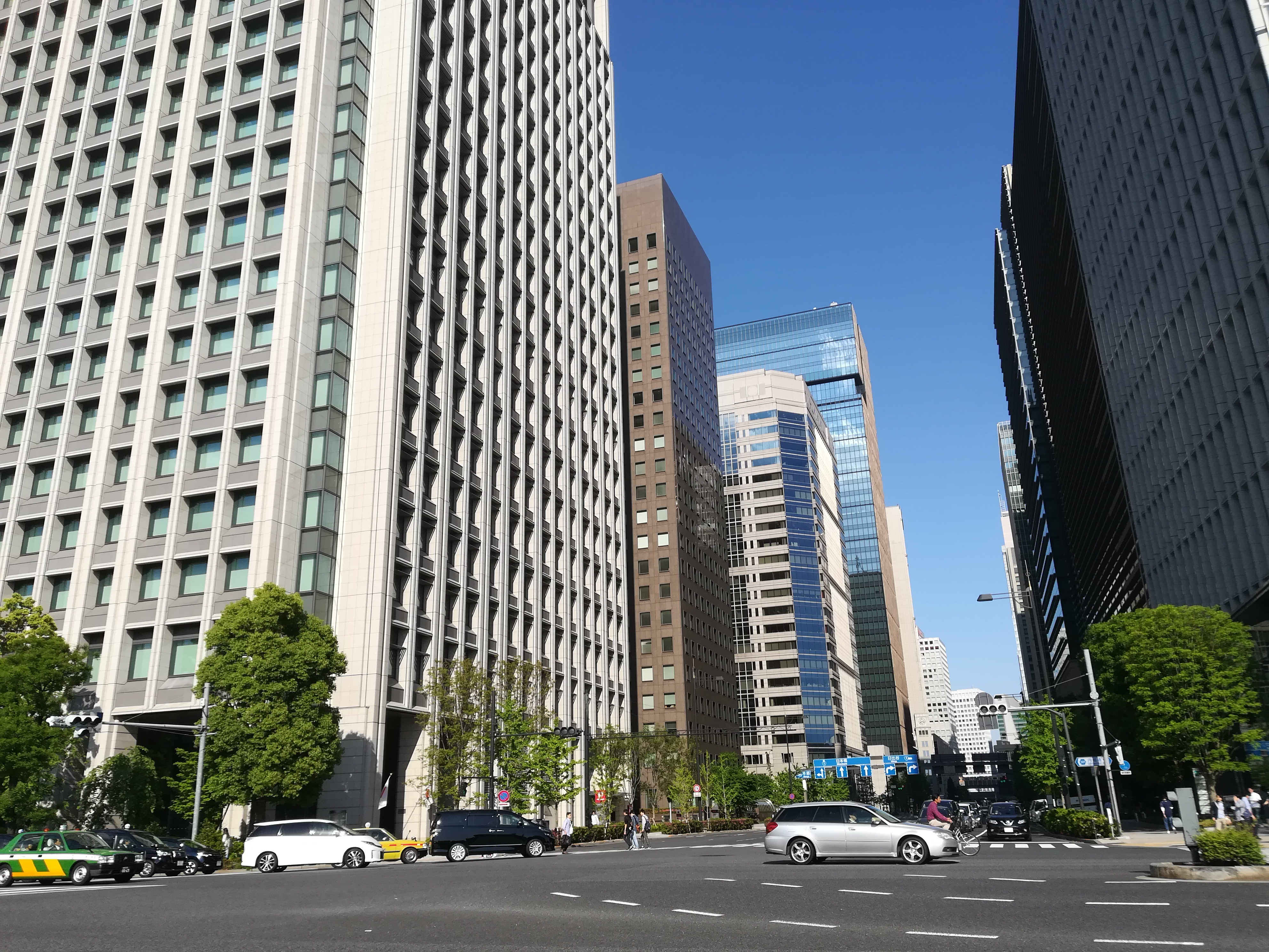 大手門交差点より